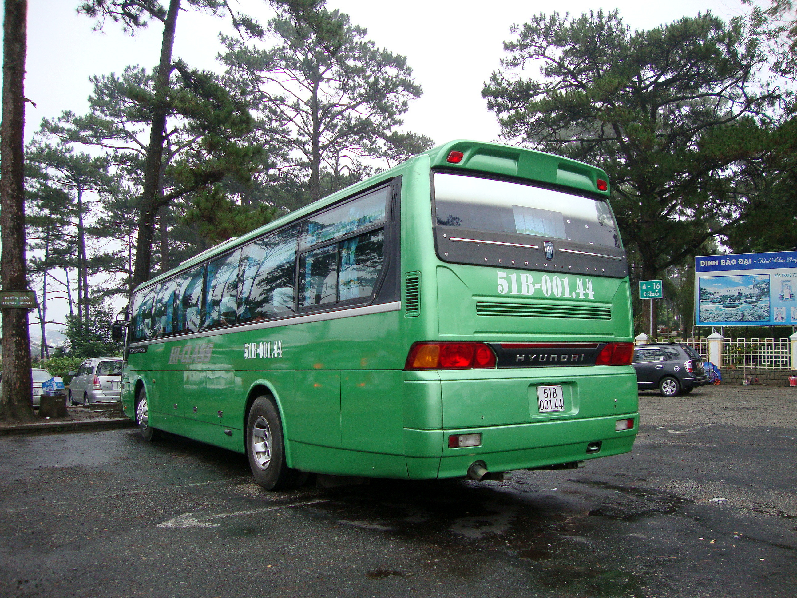 Hyundai Aero Express Hi-Class